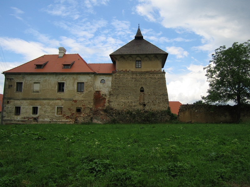 Tvrz Vrchotice, Vrchotice 5, u silnice ke dvoru Na Františku